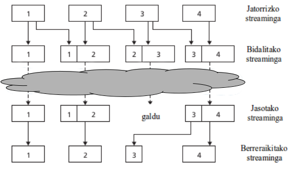 FEC kanal osagarriaren funtzionamendua